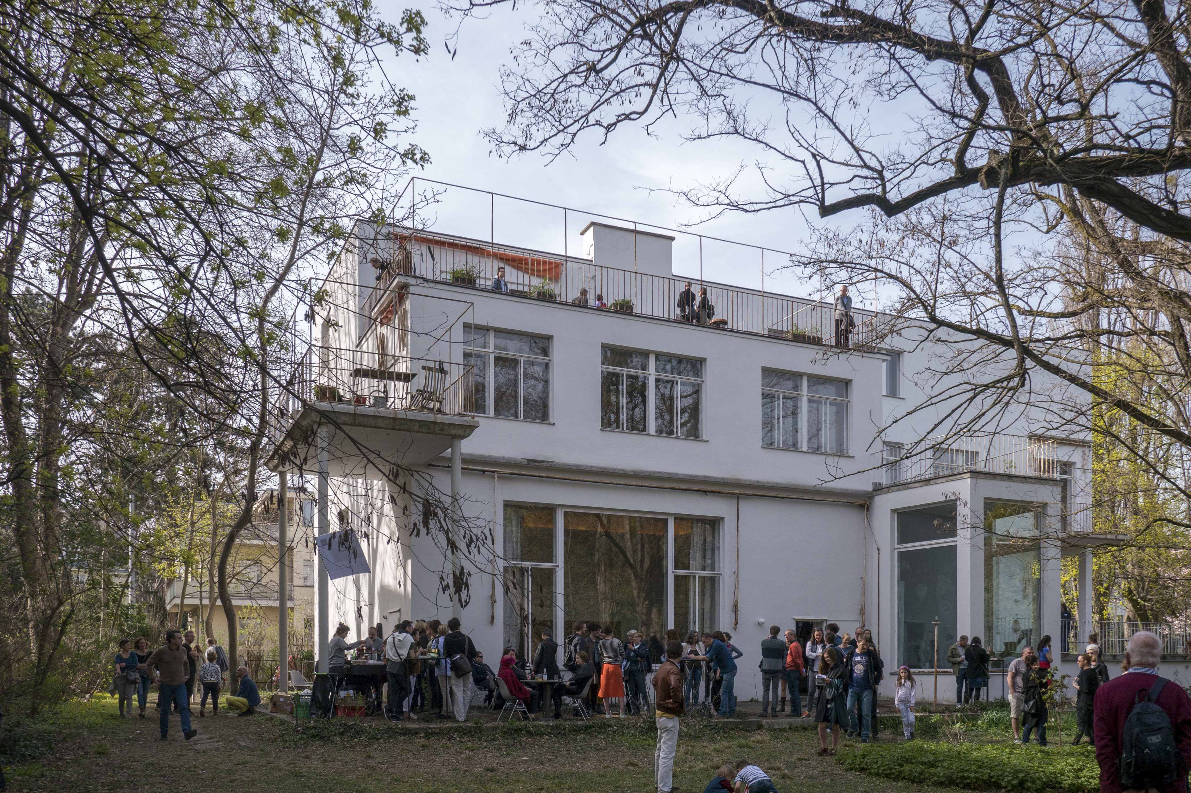 Villa / Landhaus, Haus Beer